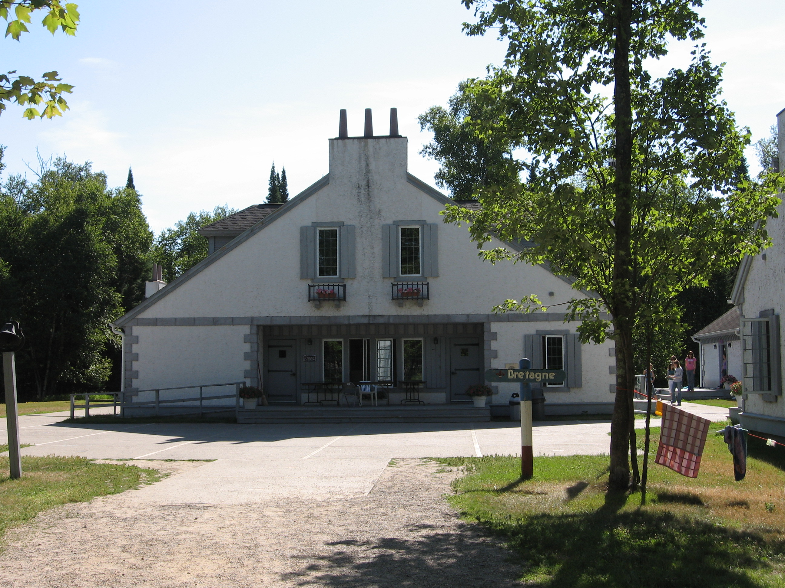 Le pavillon de Rennes au Lac du Bois à Bemidji, MN. Photo prise par John Carroll/Jean Poirier en été 2006.